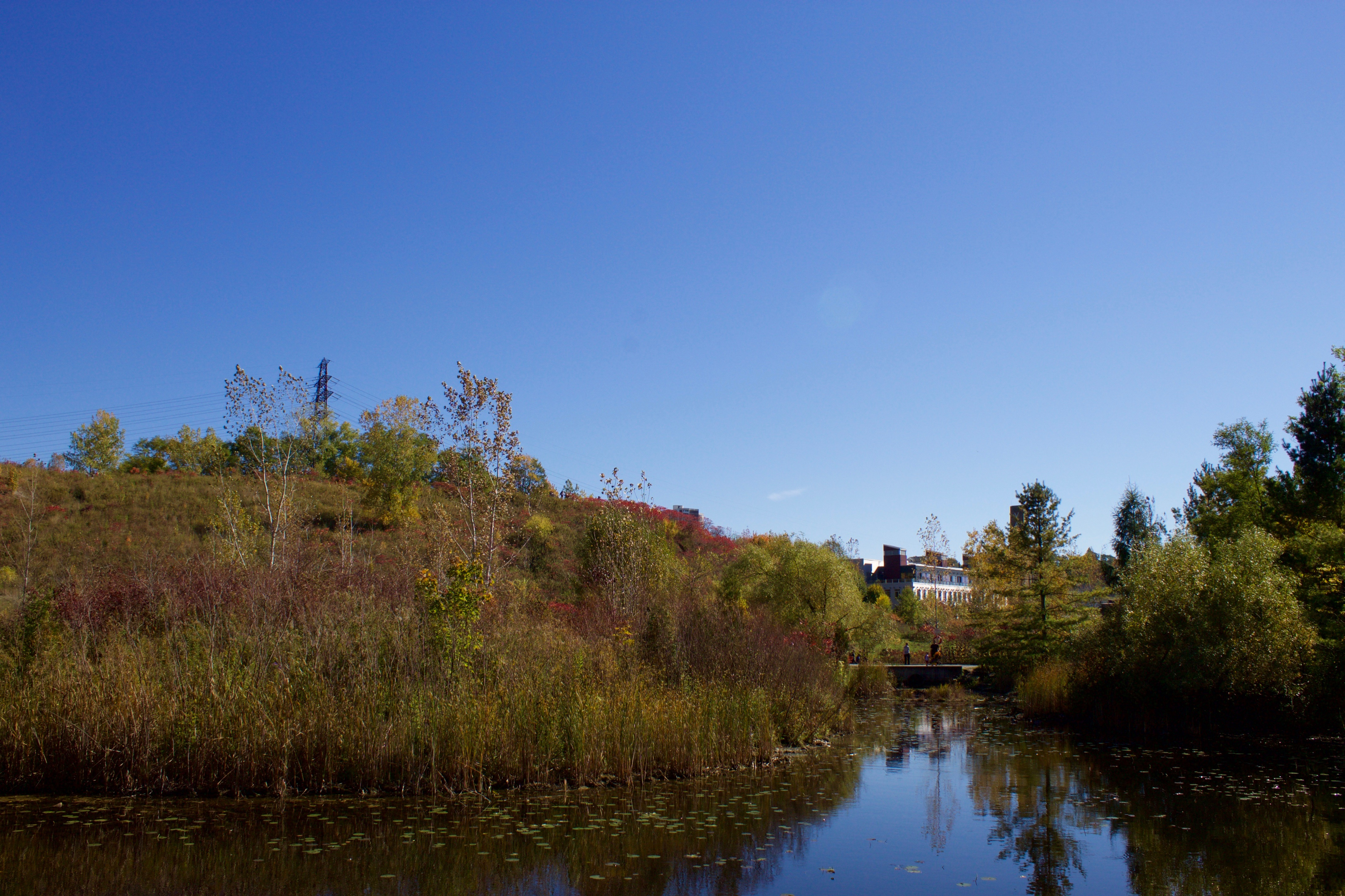 Fall 2015